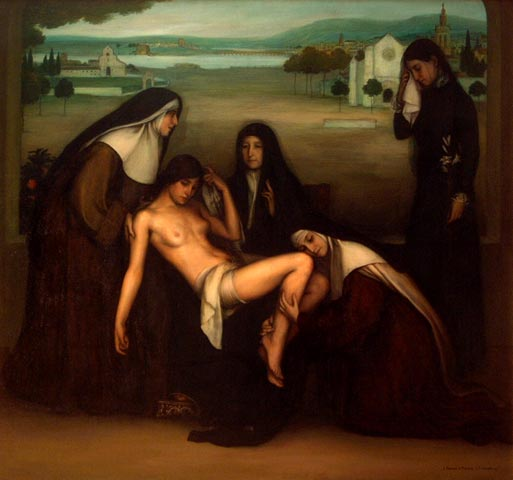 La gracia. 1915. Óleo y temple sobre lienzo. 203 x 218 cm. Museo Julio Romero de Torres, Córdoba, (España).